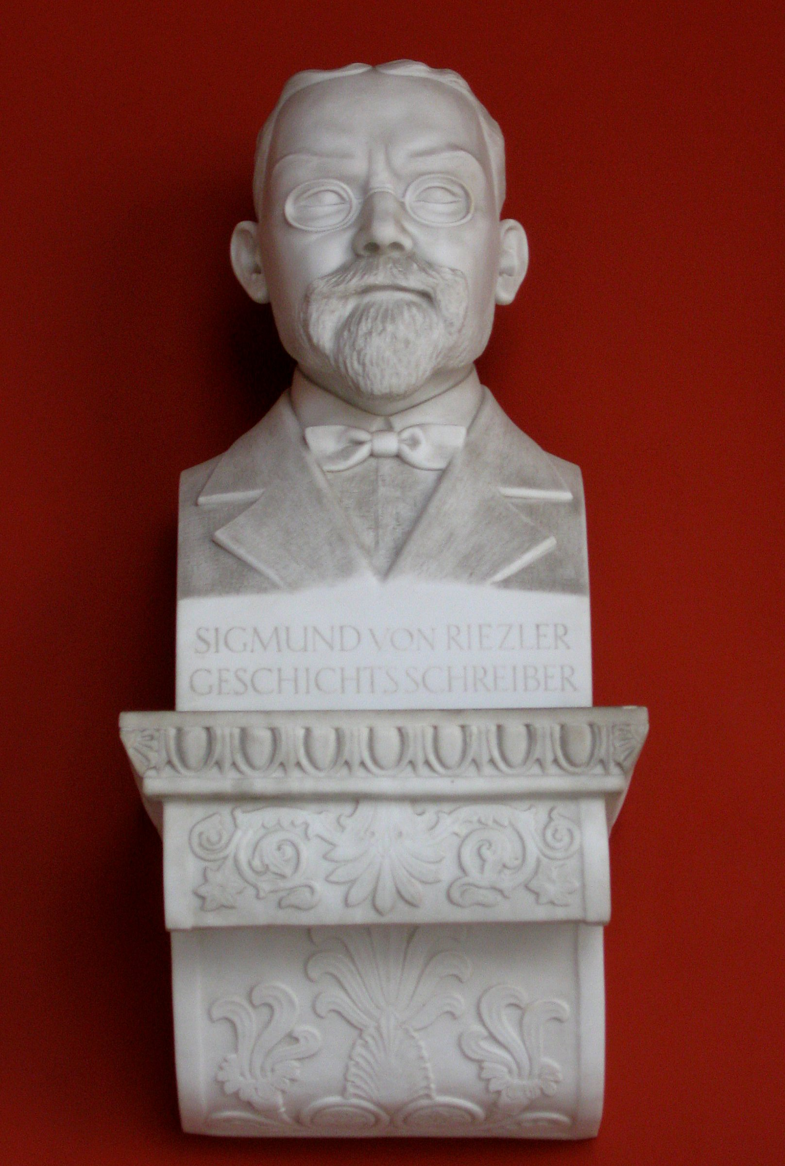 Theresienhöhe 16; Ruhmeshalle, dreiflügelige, dorische Ruhmeshalle mit Büsten verdienter Bayern, 1843–53 von Leo von Klenze. Sigmund von Riezler, Geschichtsschreiber